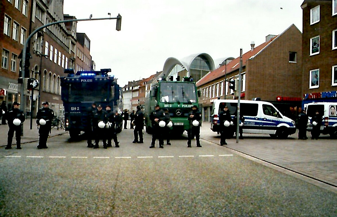 Polizeiaufgebot auf dem Kohlmarkt